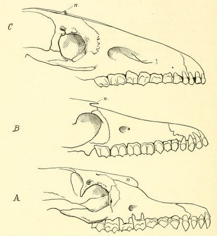 Skulls of Macraucheniidae. A: Theosodon. B: Scalabrinitherium. C: Macrauchenia. n: nasal bones.